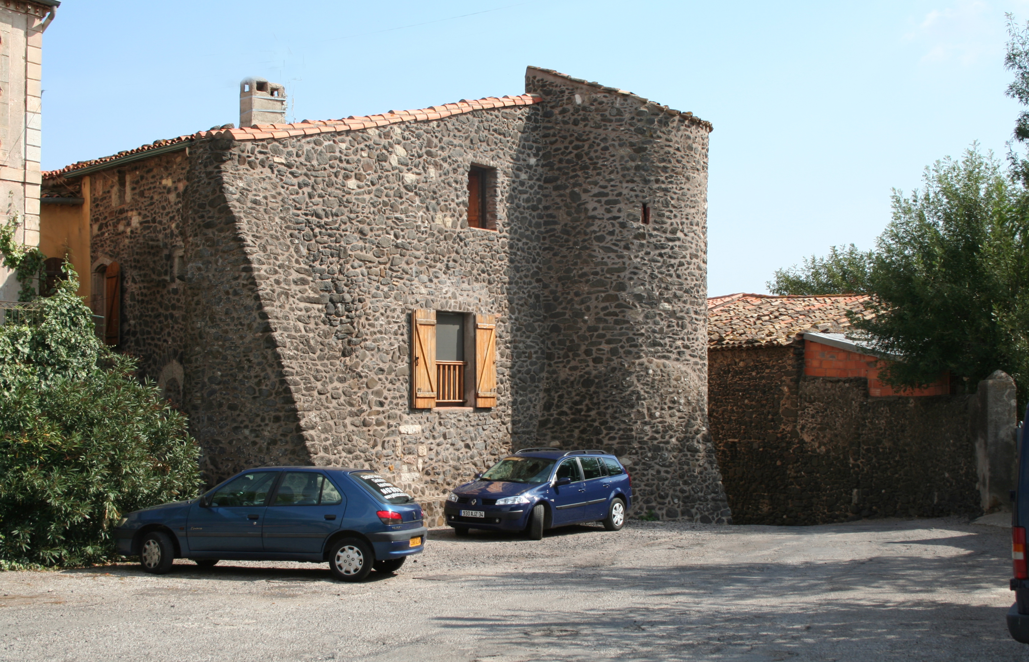 Lacoste (Hérault) - Château.